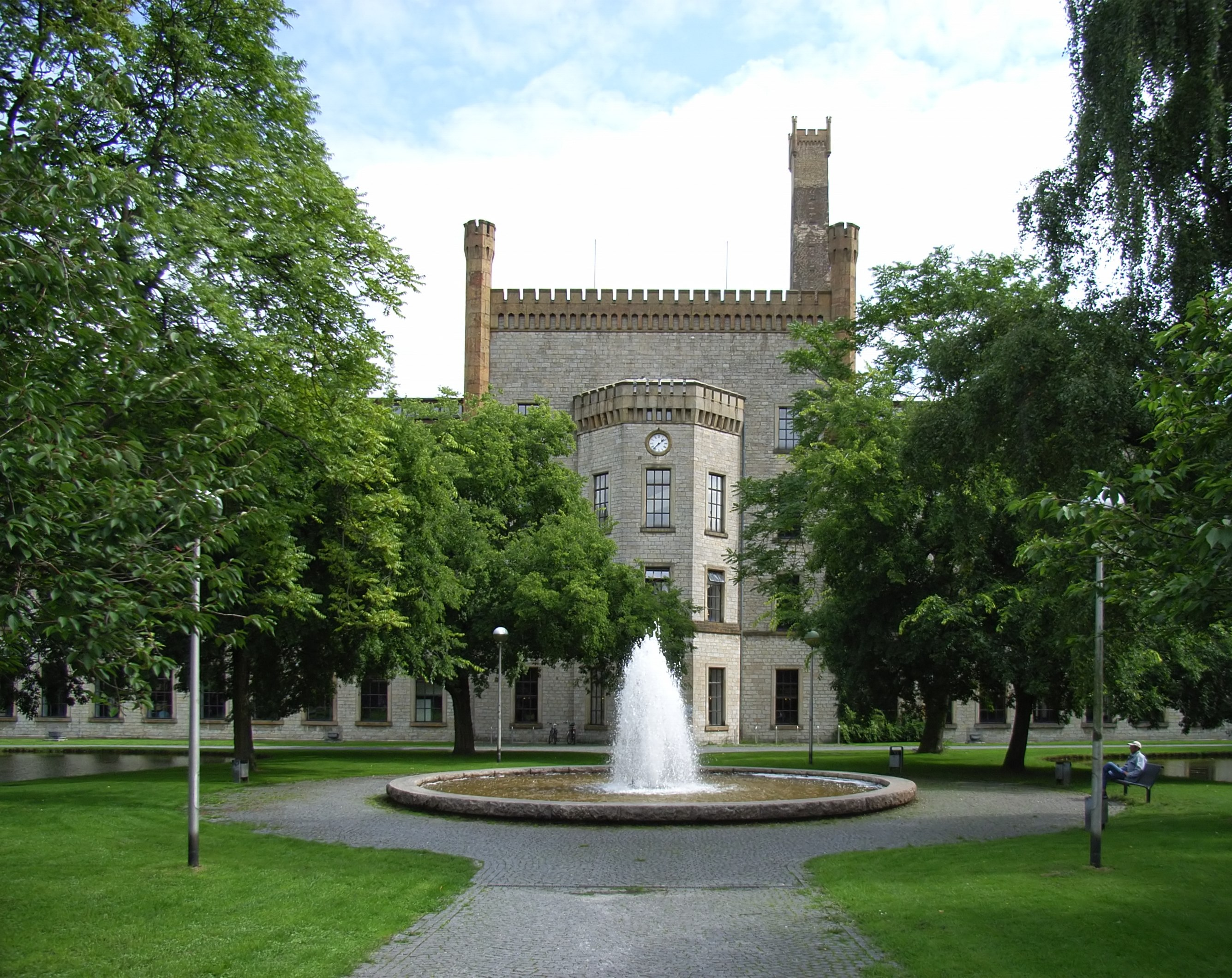 Bielefeld, Deutschland: Ravensberger Spinnerei, Rochdale Park.